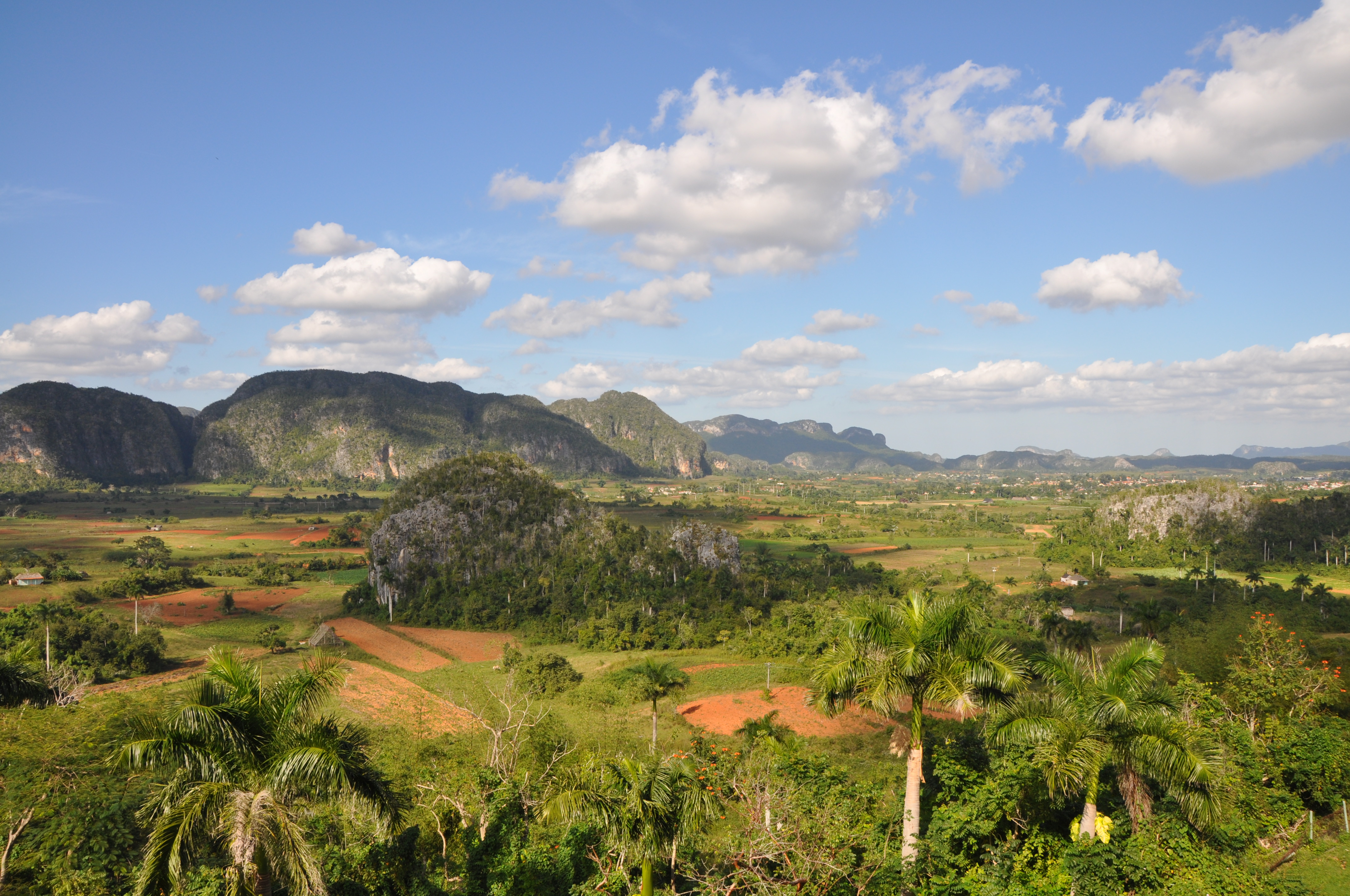 Détail de la vallée de Viñales à Cuba. Photo prise à Cuba par moi-même avec un Nikon D-90 le 31 décembre 2009.